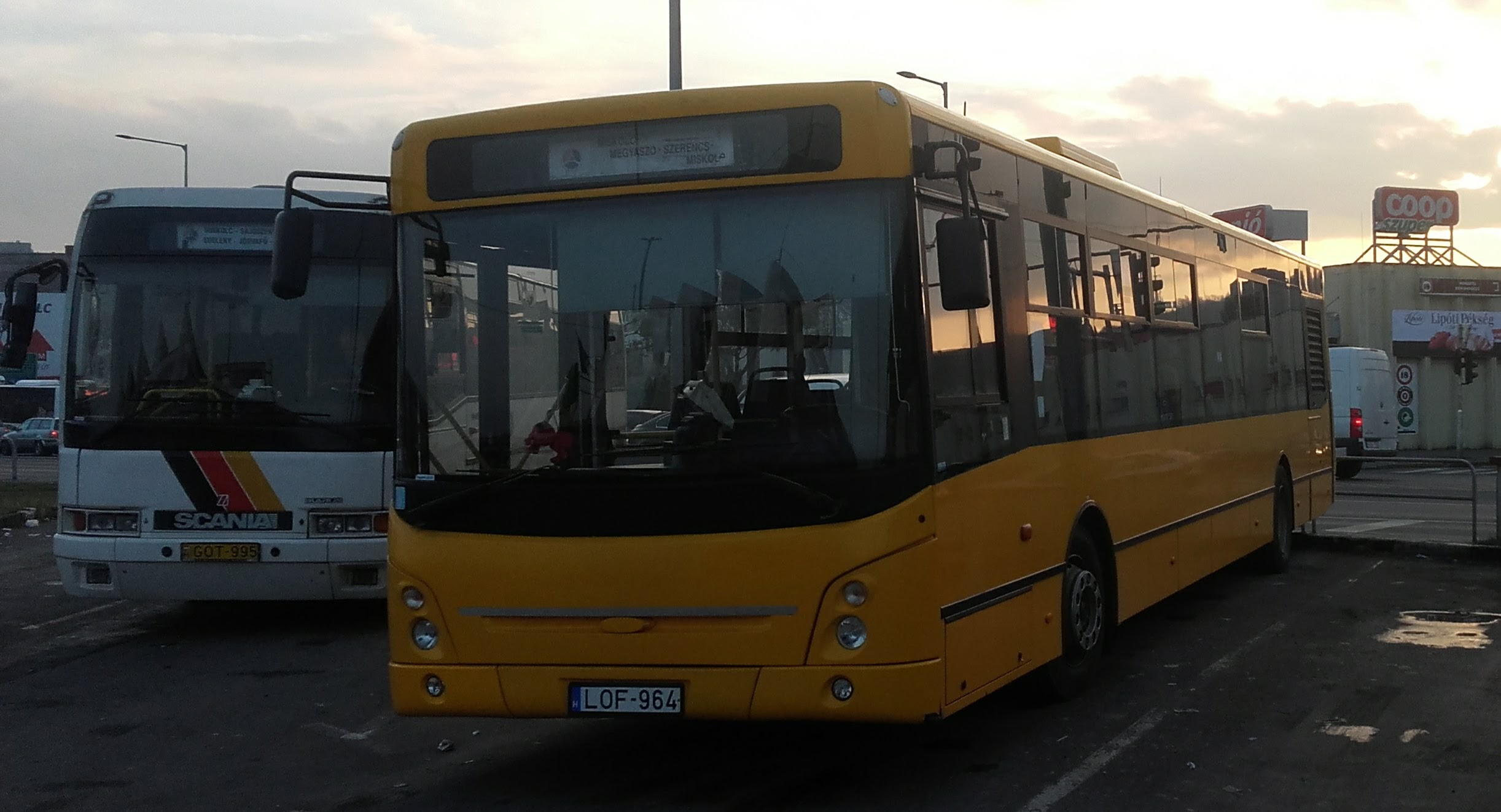 Az ÉMKK LOF-964 rendszámú Ikarus-ARC E127 típusú busza Miskolcon, a 3730-as helyközi járaton.